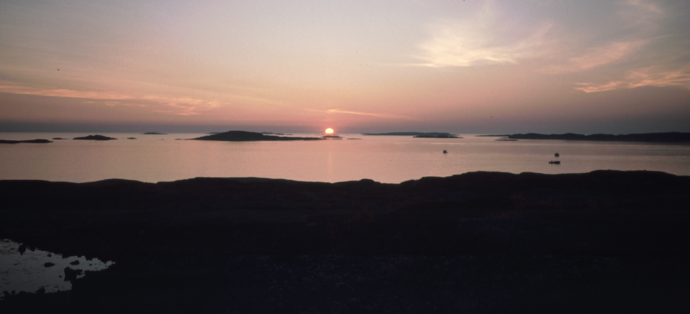 Norrut över Musös rumpehällar. Måseskär i fonden, Otterön till höger. JS 1990